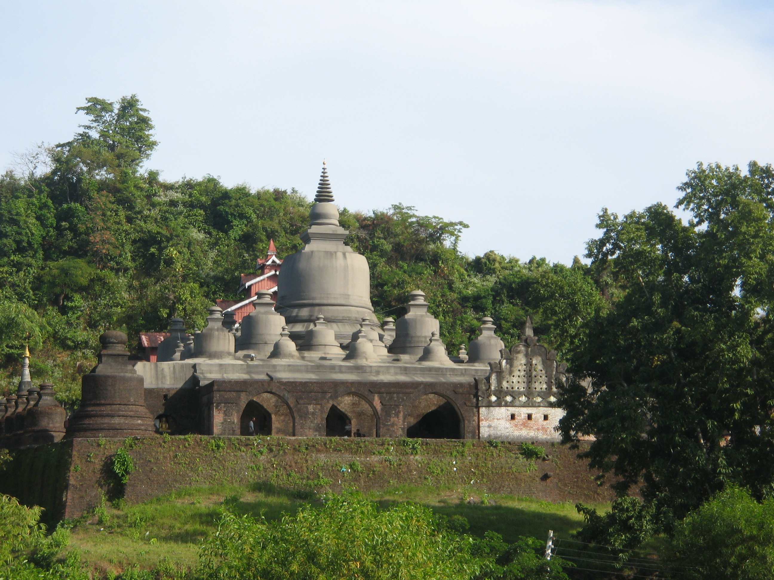 Shitthaung Temple, Mrauk U, Burma